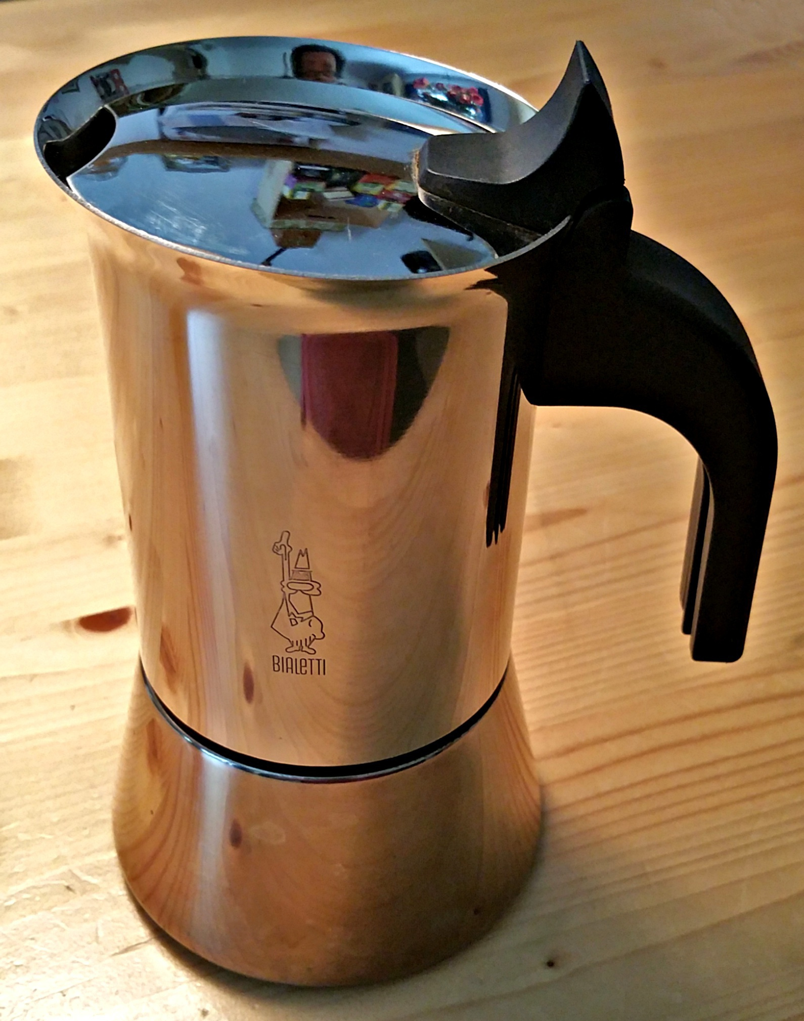 Edelstahlkanne der Firma Bialetti Modell "Venus" zu Herstellung eines Moka